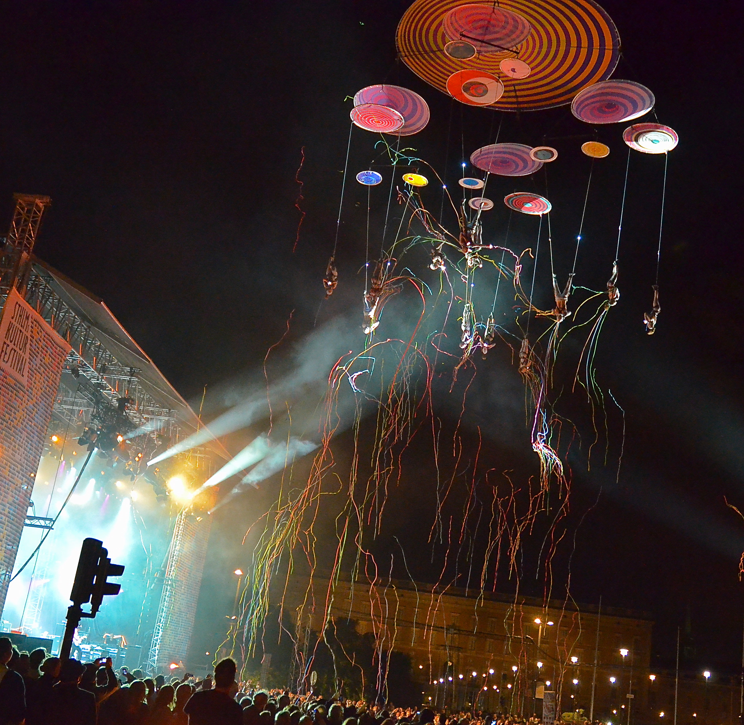 Voala Project Muare under Stockholms Kulturfestival 2012.